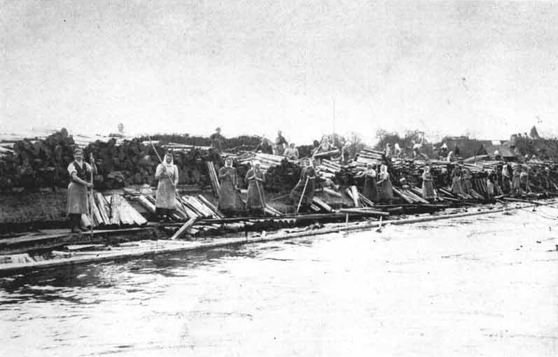 Scheiterschwemme auf der Naarn, Holzausspießen beim Perger Holzplatz